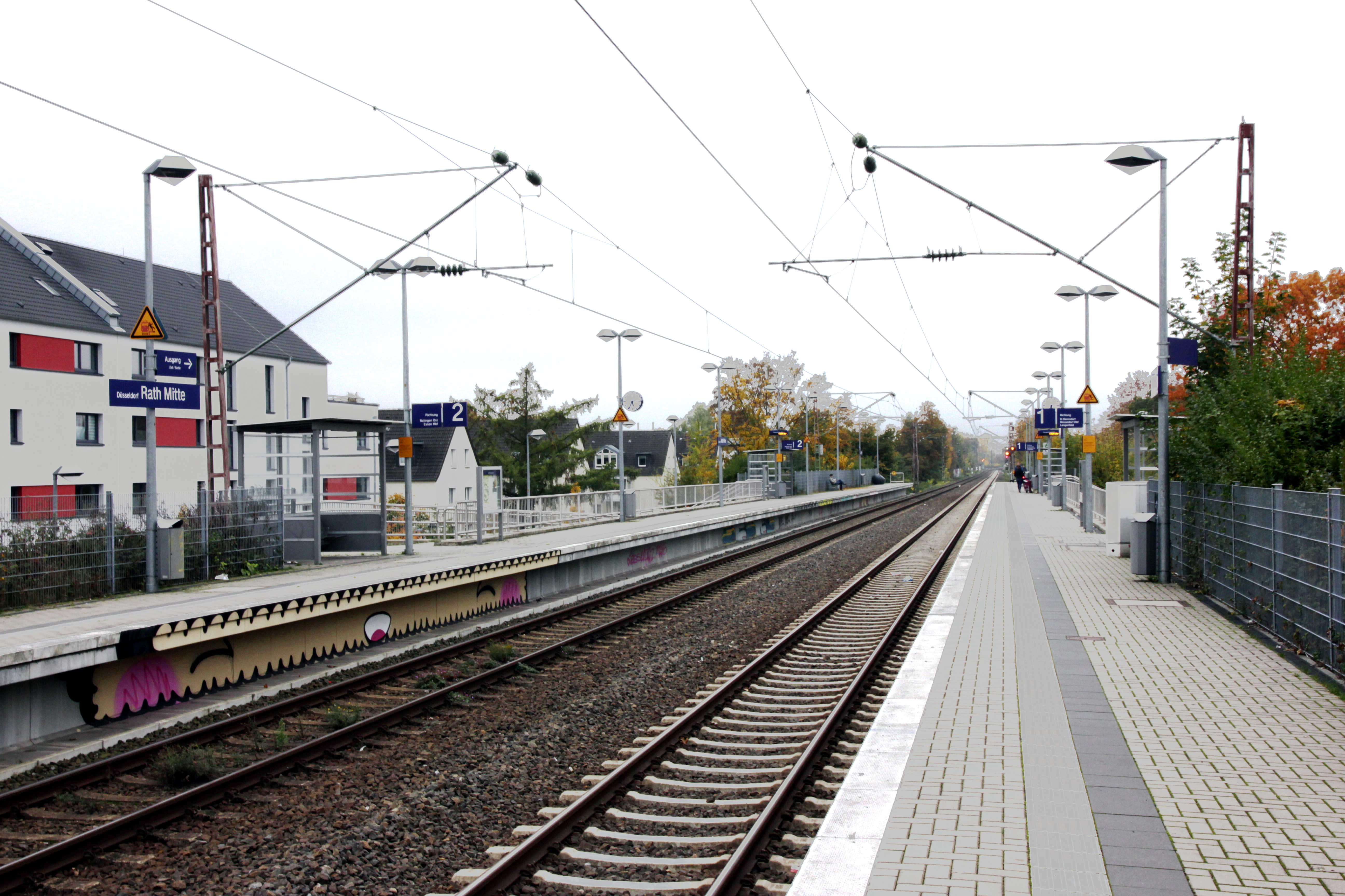 Haltestelle S-Bahnhof "Düsseldorf Rath Mitte S", aufgenommen 2016-10-28